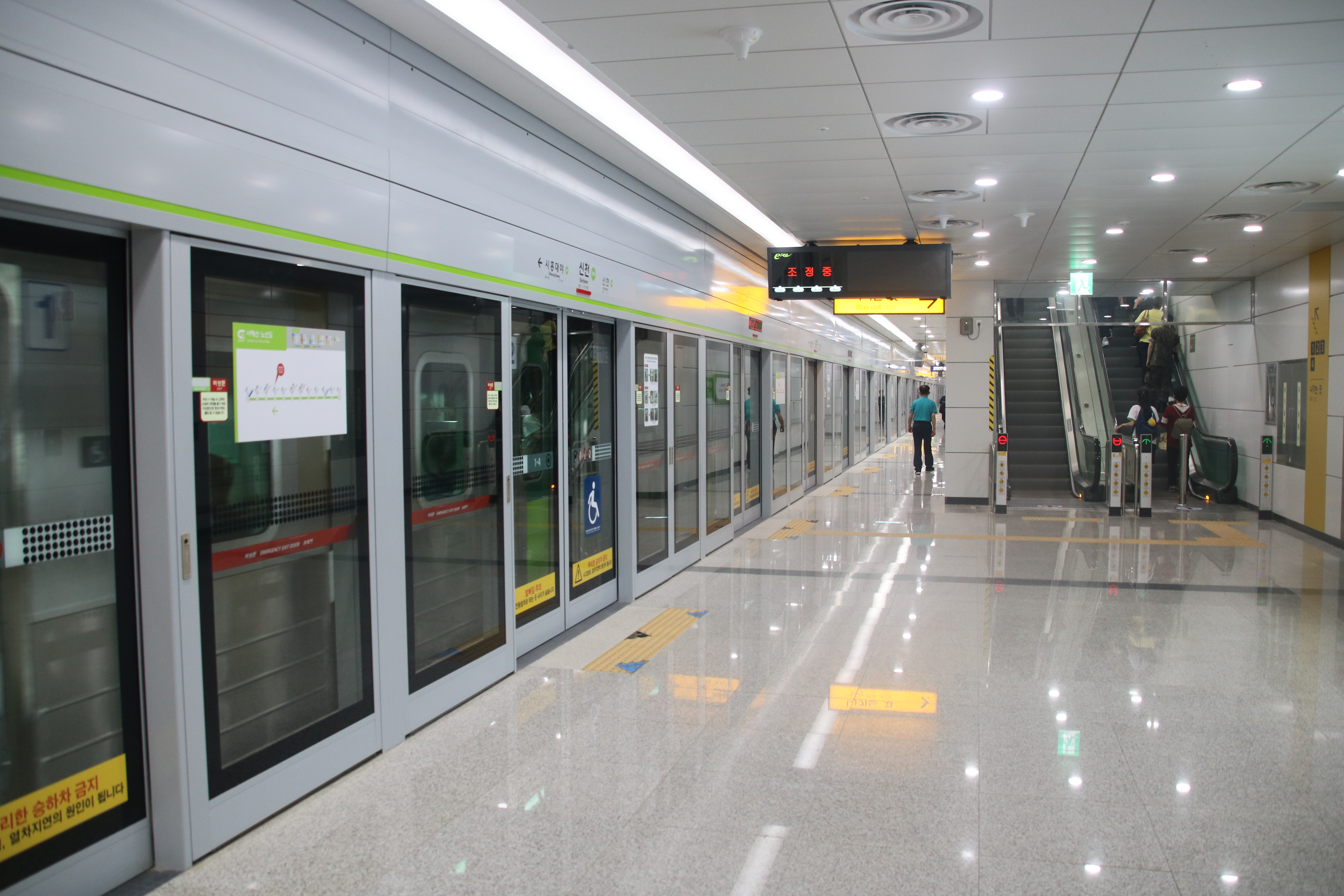 서해선 신천역 승강장